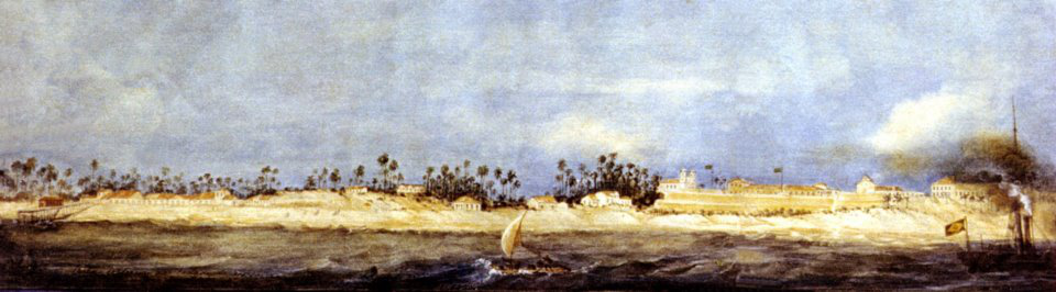 Gravura retratando a orla de Fortaleza.